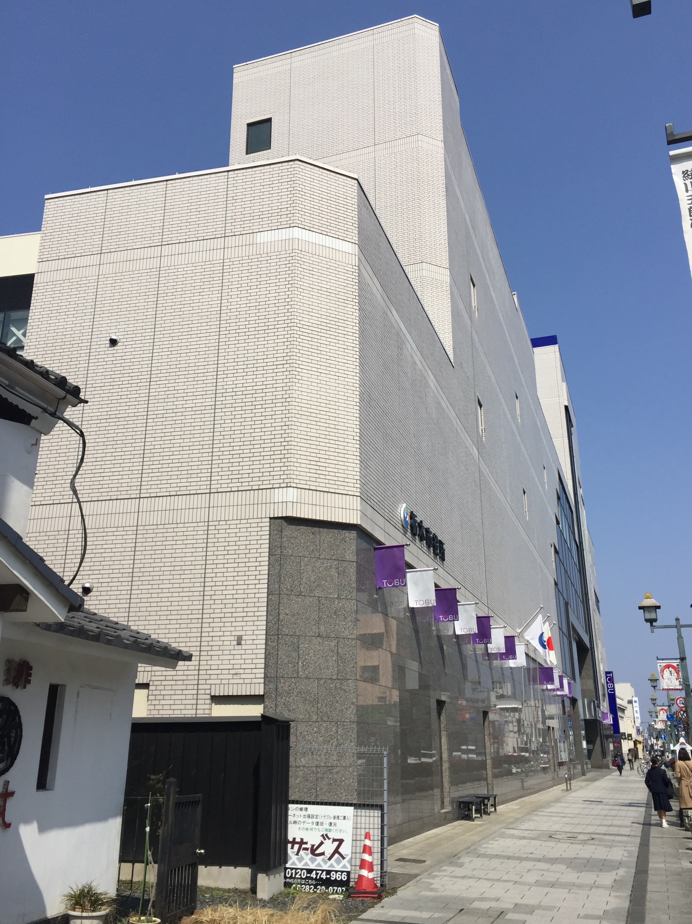 2014年から使用されている栃木市役所の庁舎。東武百貨店との複合施設